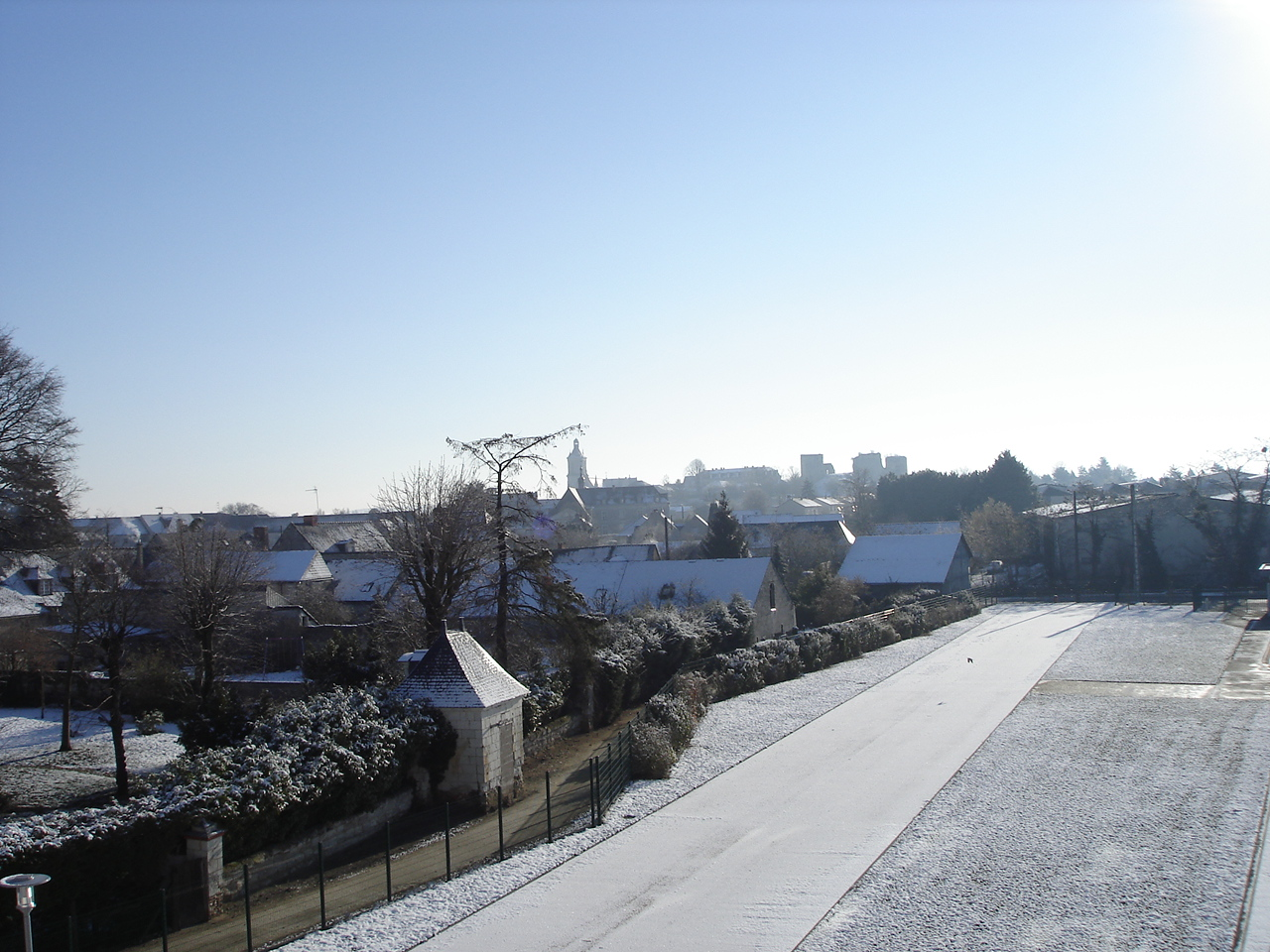 Vue de Beaufort-en-Vallée sous la neige. Faite le dimanche 5 mars 2006.